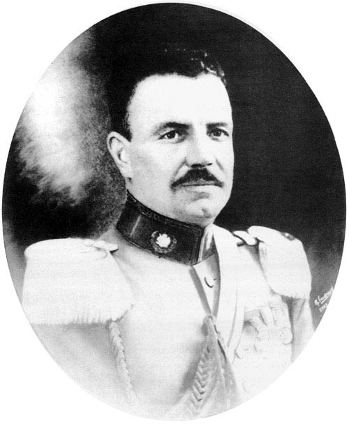 Carlos Ibáñez del Campo (* Linares, 3 de noviembre de 1877 - † Santiago de Chile, 28 de abril de 1960) fue un militar, político y dictador chileno. Fue Presidente de la República en dos ocasiones: de 1927 a 1931 y de 1952 a 1958.